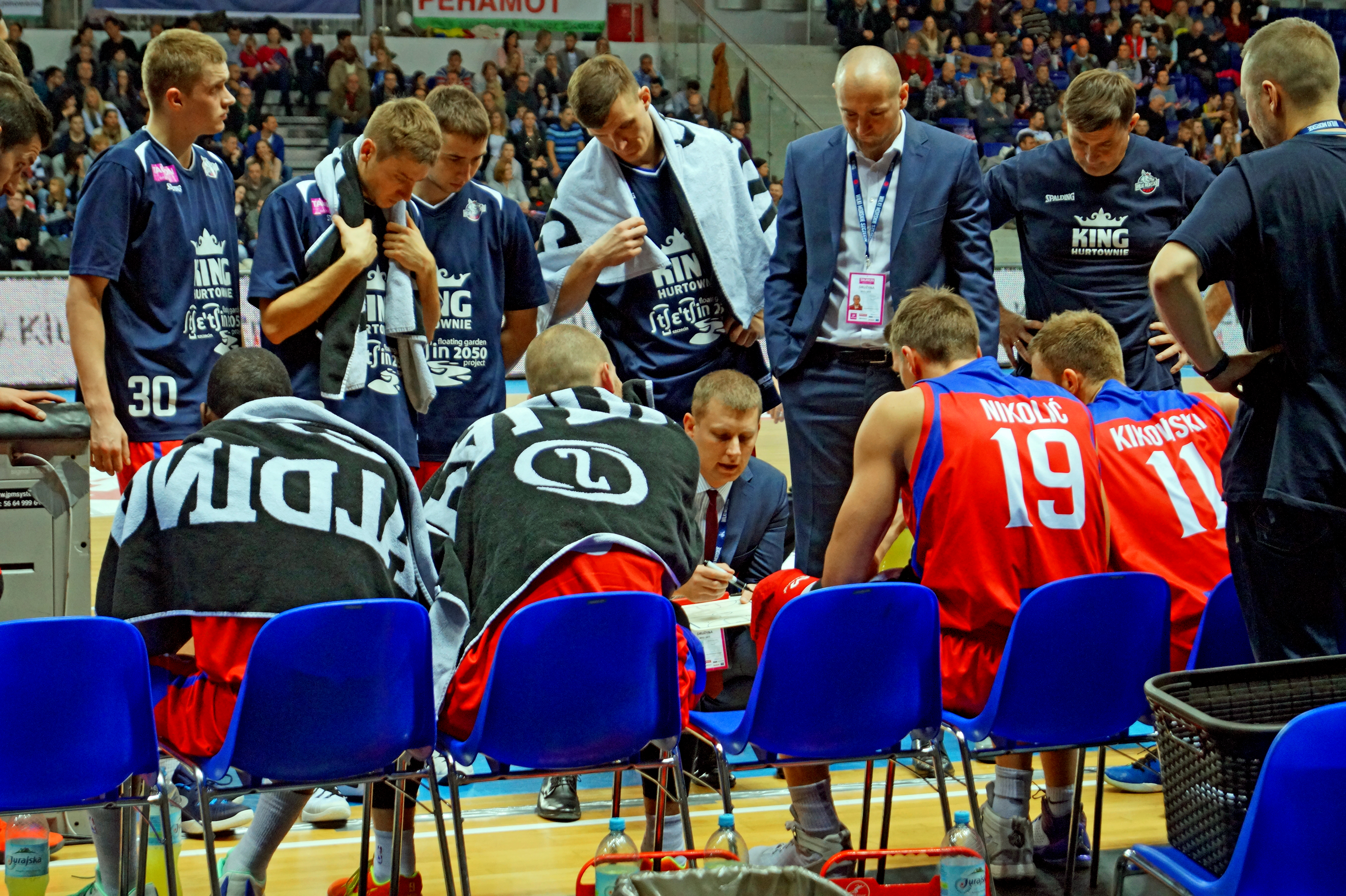 Wilki Morskie Szczecin (Marek Łukomski, trener, kuca w środku ), Arena Szczecin (Azoty Arena) w Szczecine, Polska